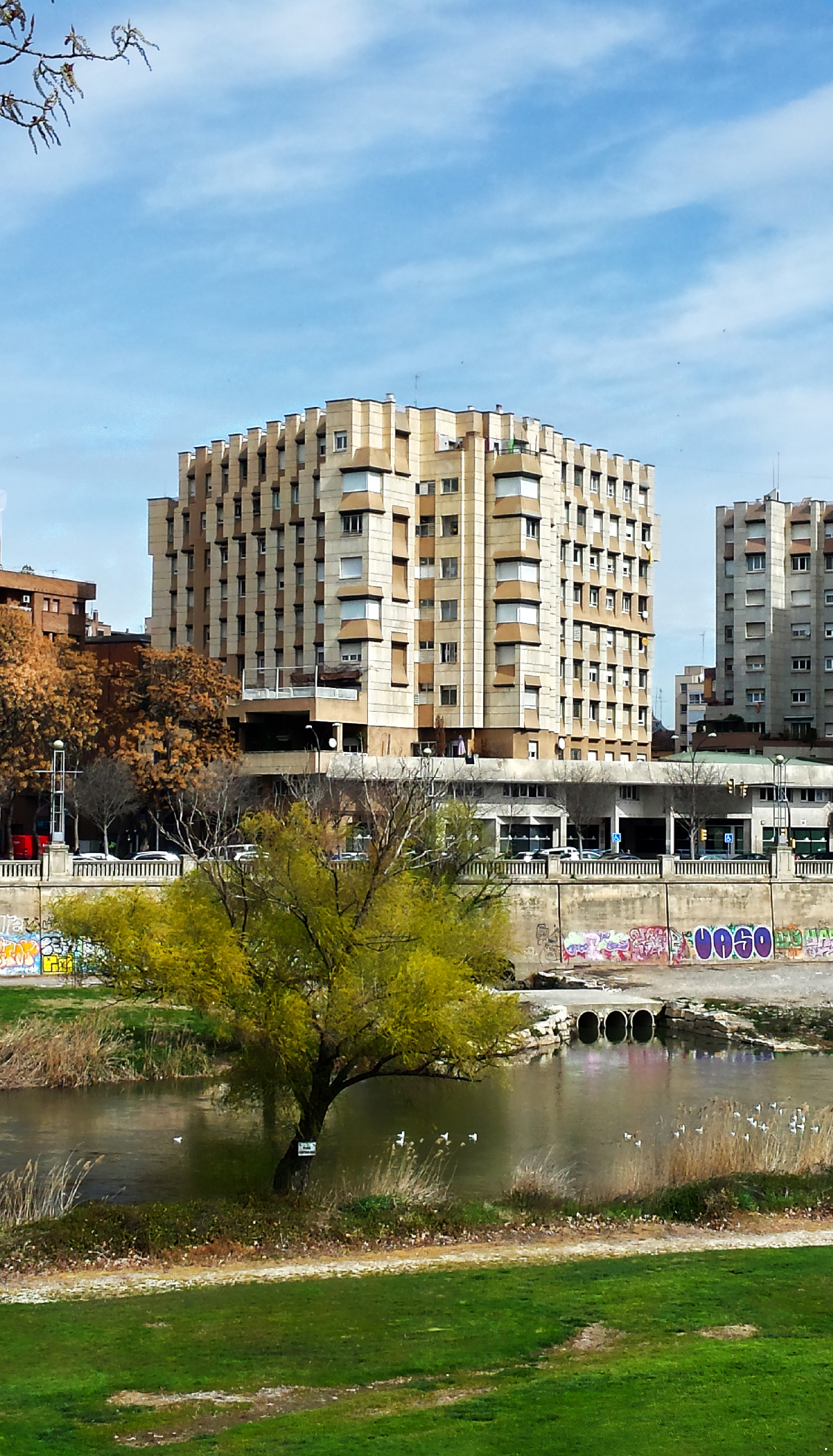 El rio Noguerola, también cononocido como la clamor de Noguerola o la clamor de Balàfia.